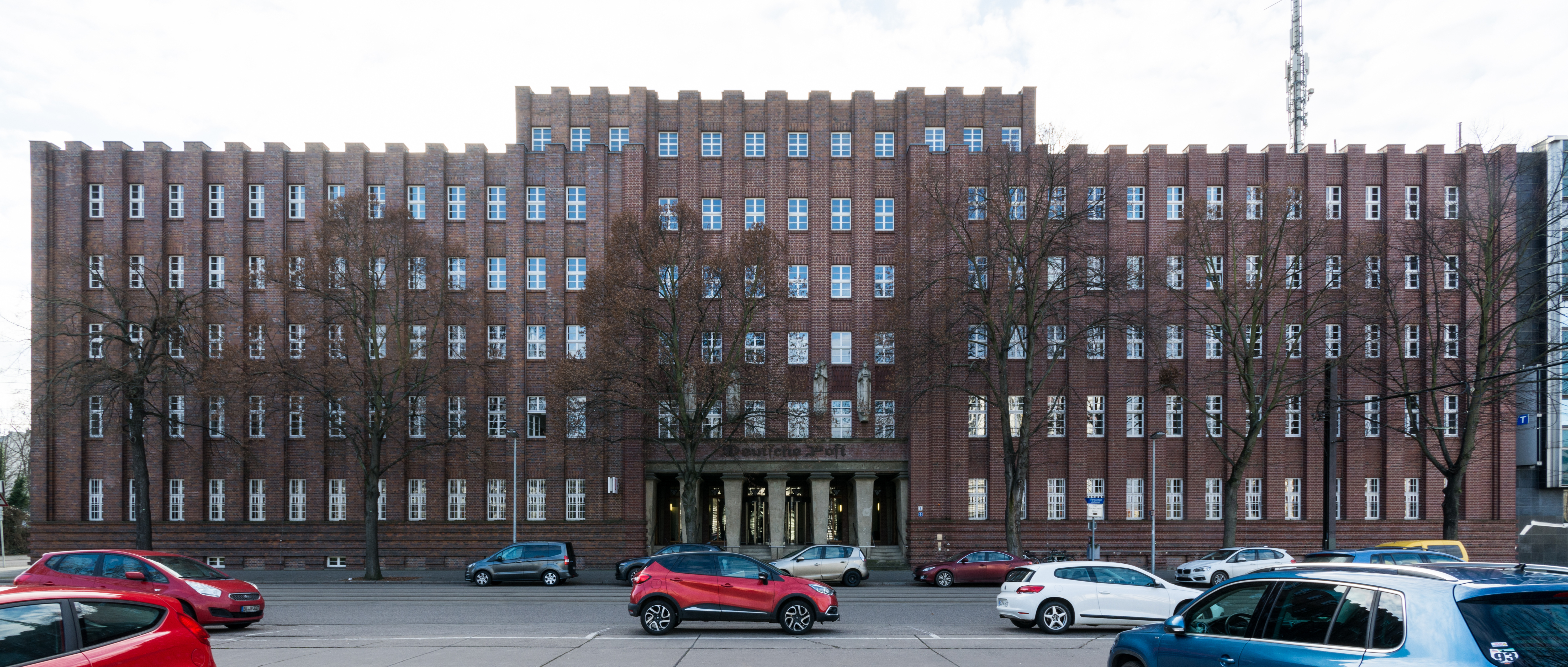 Fernmeldeamt Listemannstraße 6 in Magdeburg-Altstadt. This is a photograph of an architectural monument. 17425